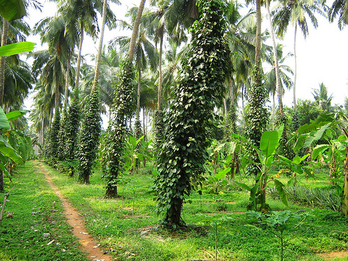 CPCRI, Kasaragod, Kerala, India.